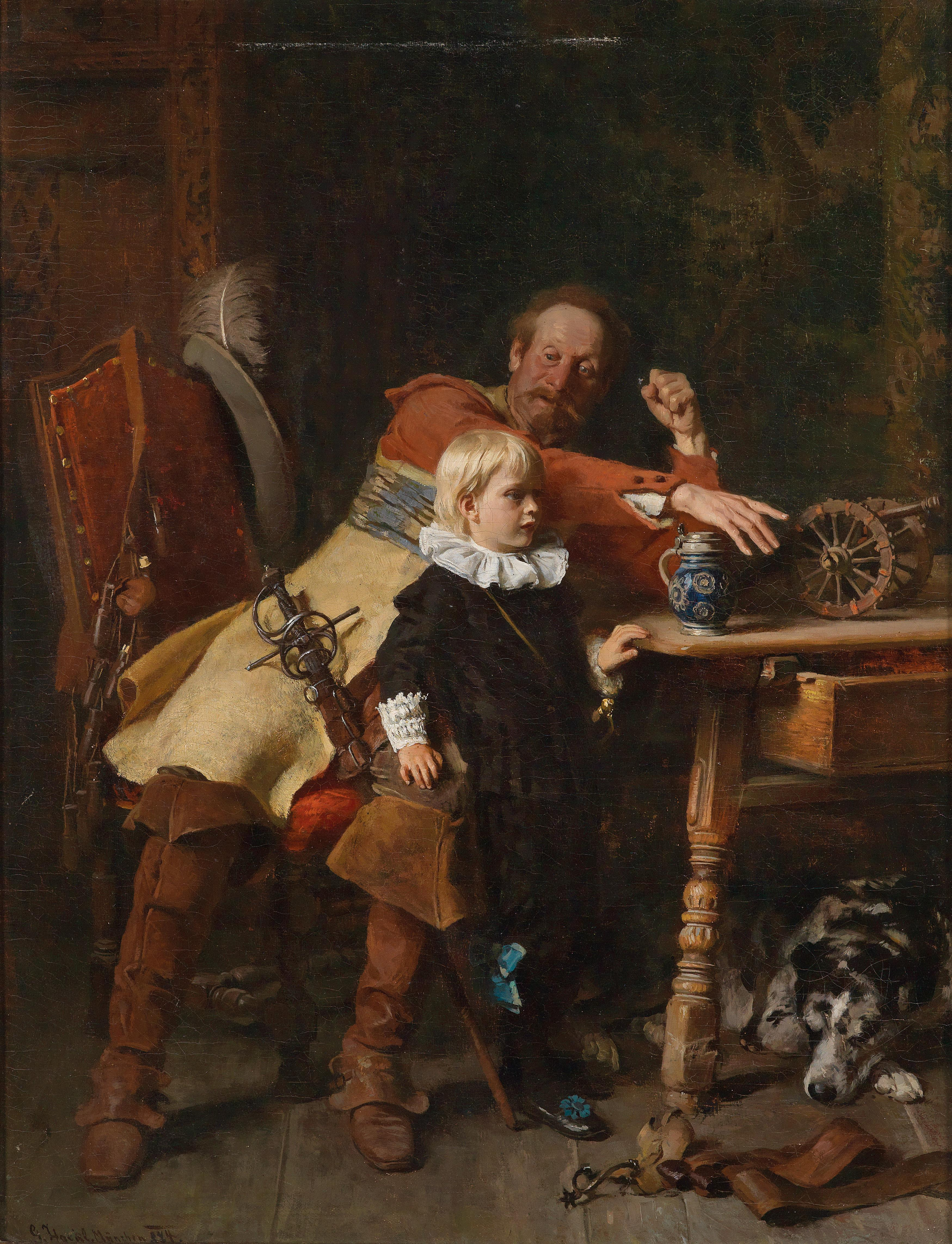 Der kleine Soldat, signiert, bezeichnet und datiert G. Hackl, München, (1)874, Öl auf Leinwand, 73,5 x 55,5 cm